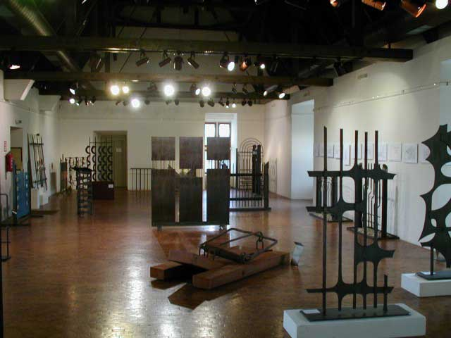 Burgalerie_in_Stolberg_(Rhld.)